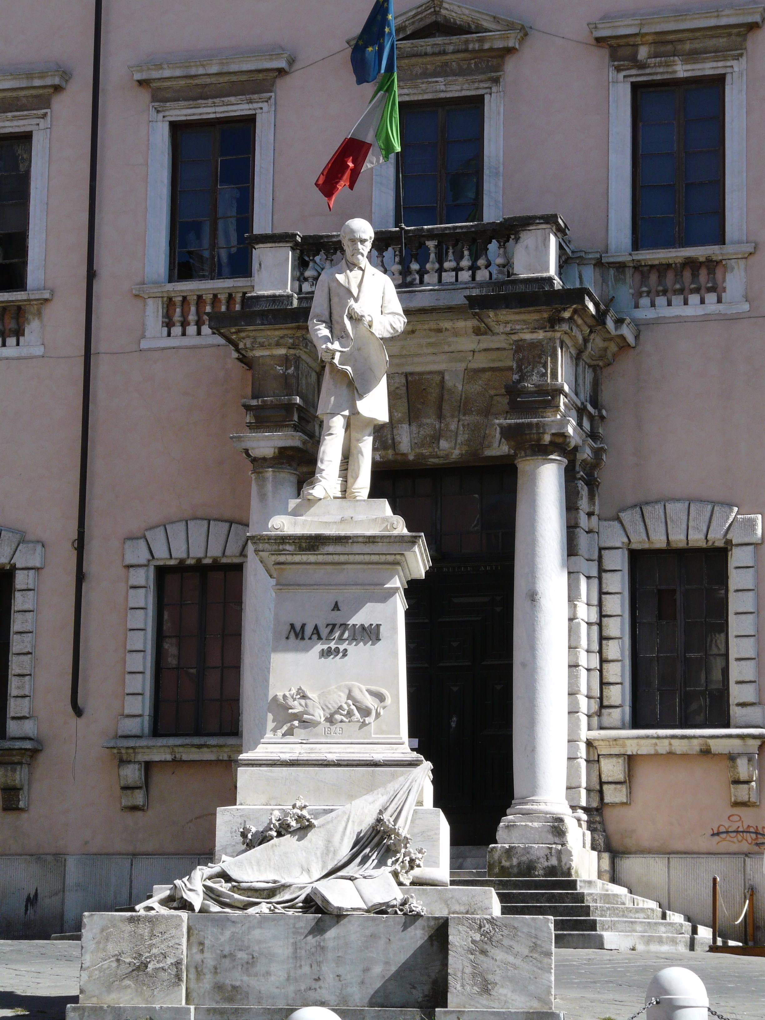 Piazza Accademia e monumento a Giuseppe Mazzini, Carrara, Toscana, Italia